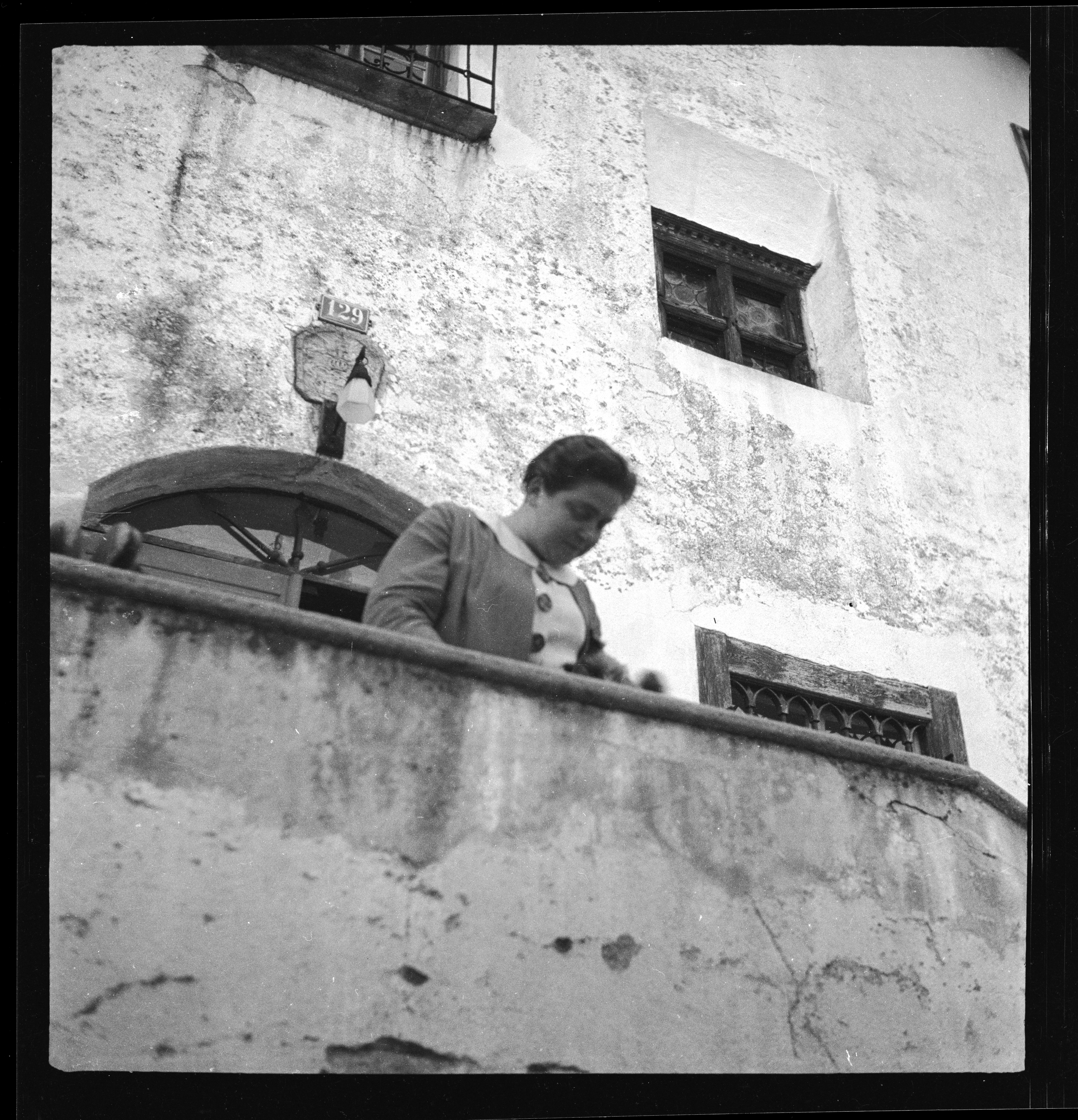 Schweiz, Sils: Menschen; Therese Giehse auf der Treppe vor der Chesa Salis; Segl